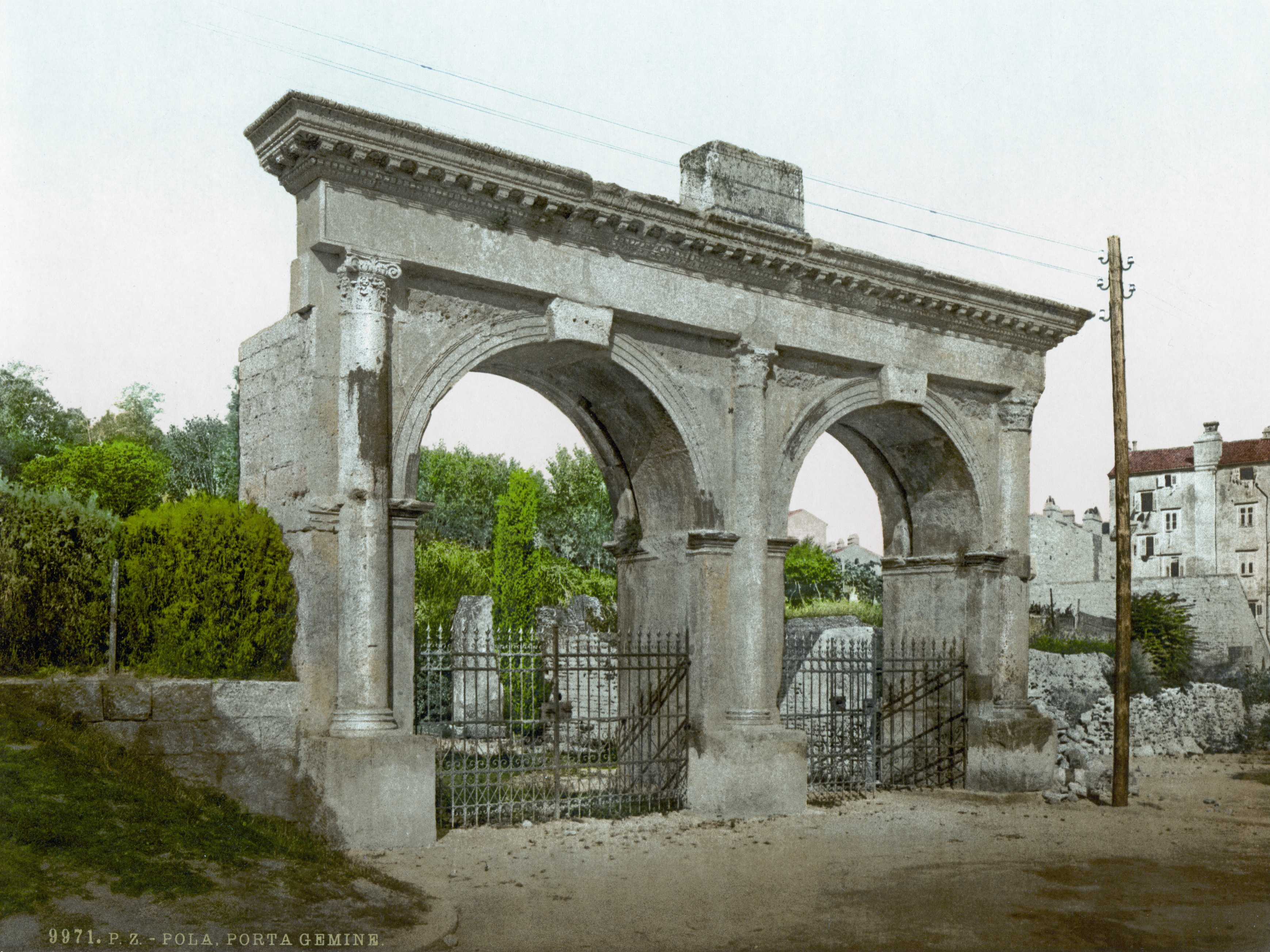 Pola Porta